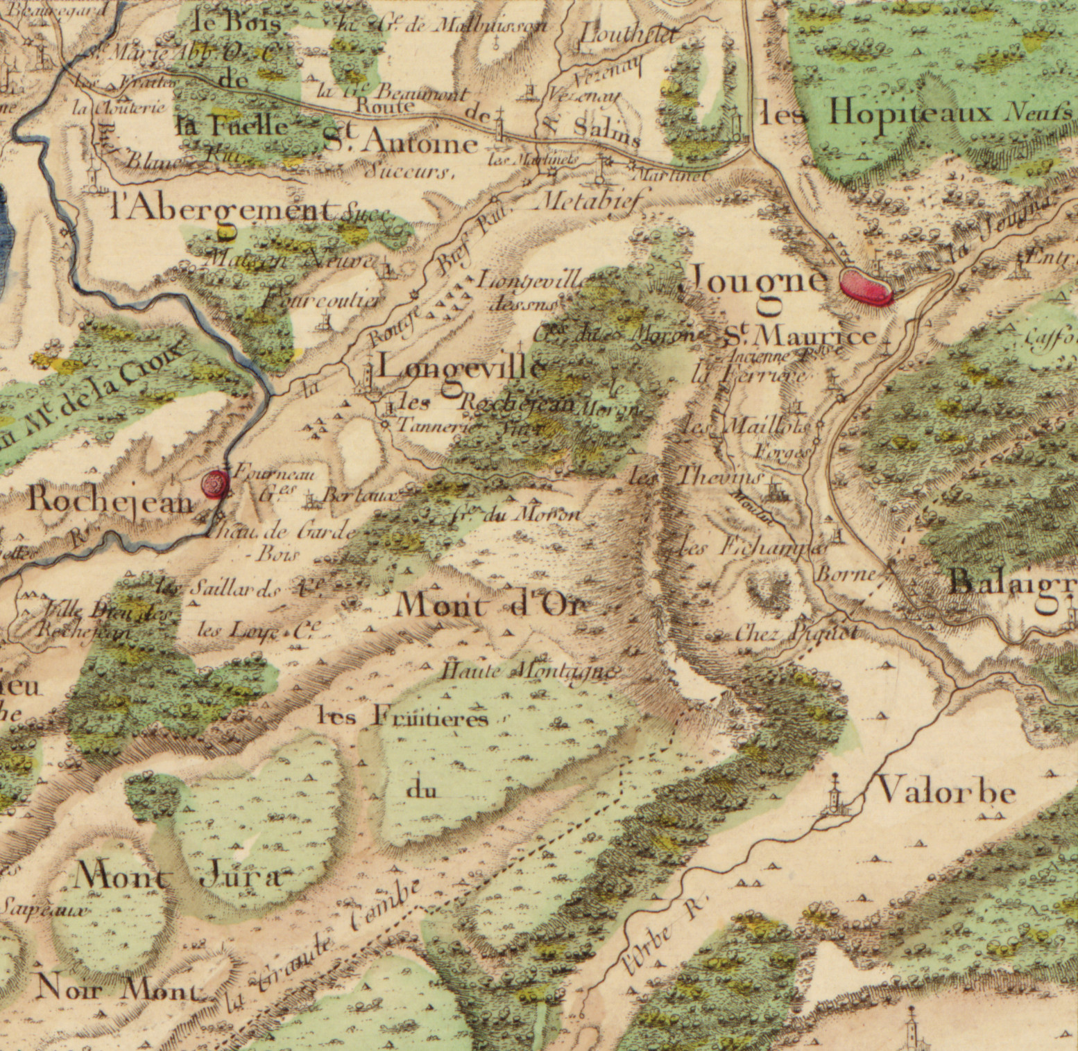 Carte de Cassini n°147 (Nozeroy, zoom sur Métabief), 1759.